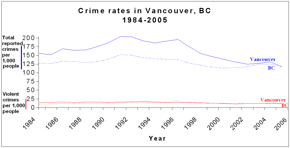 Crime trend